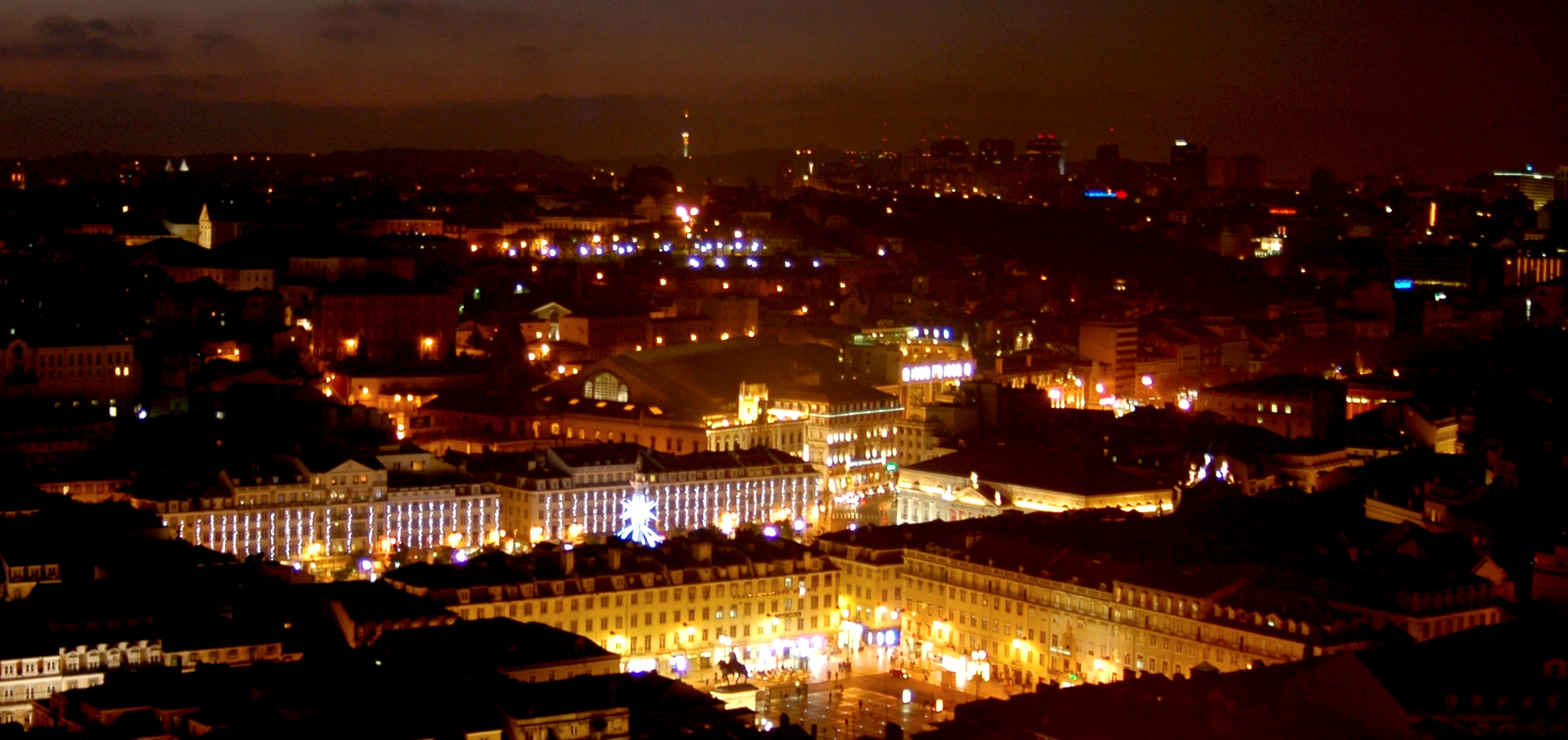 Nuit à Lisbonne